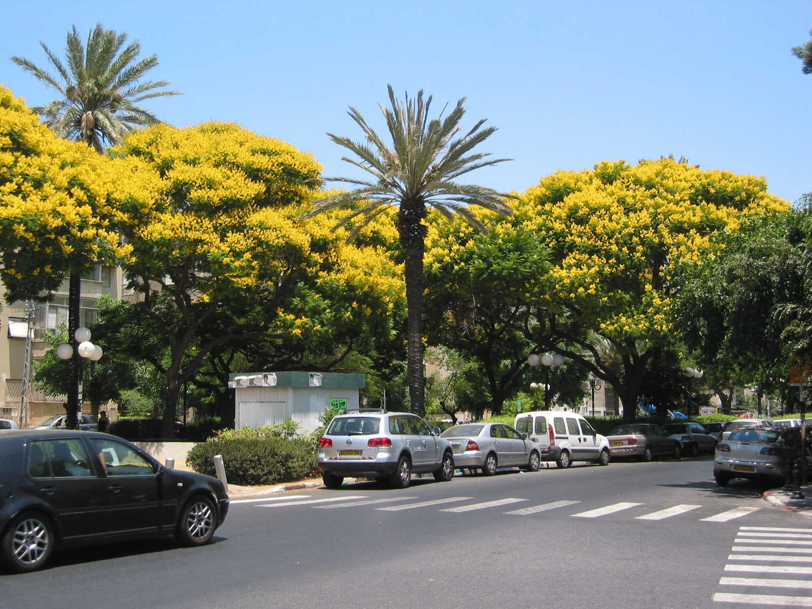 Masarik square, Tel Aviv